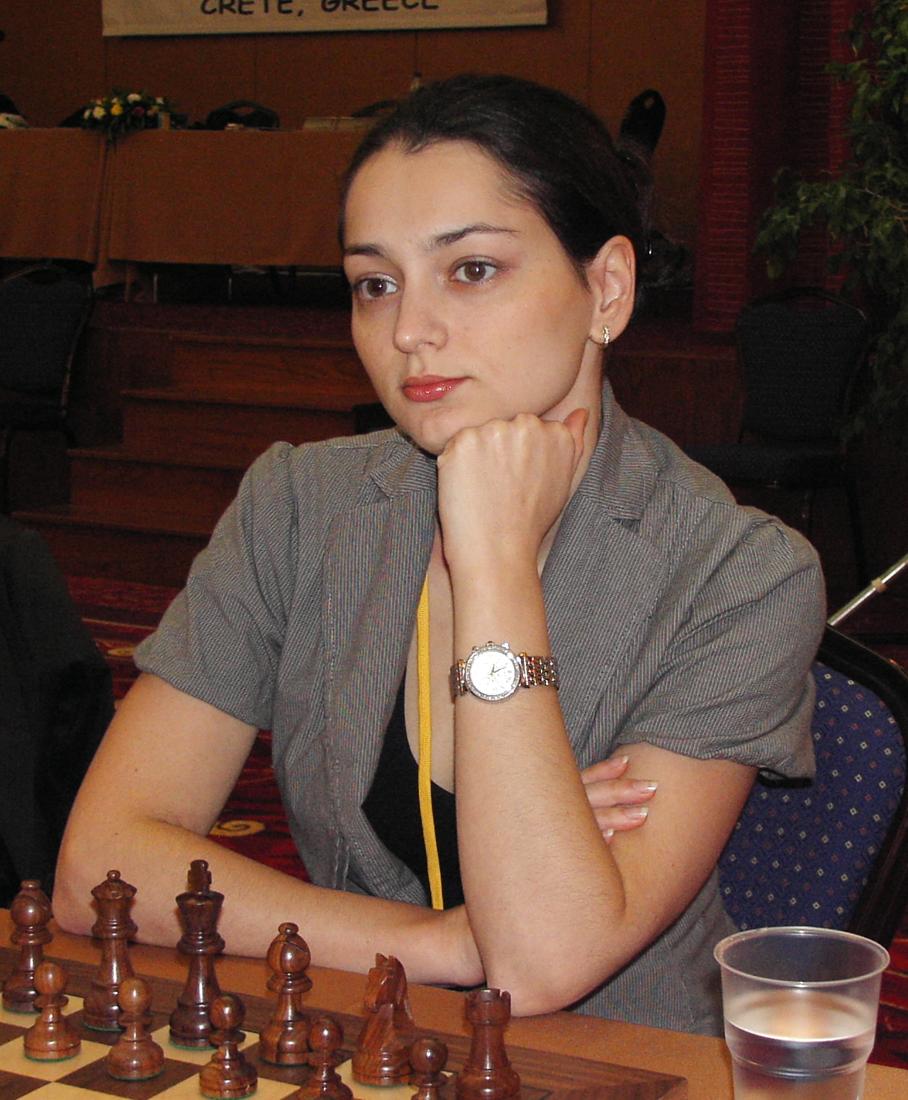 GM Alexandra Kosteniuk Russia, EuroChess Iraklion 2007